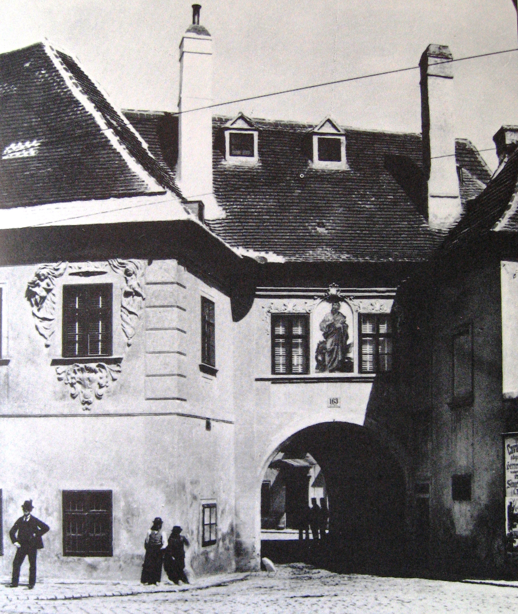 Wien Brauhaus Sankt Marx um 1900